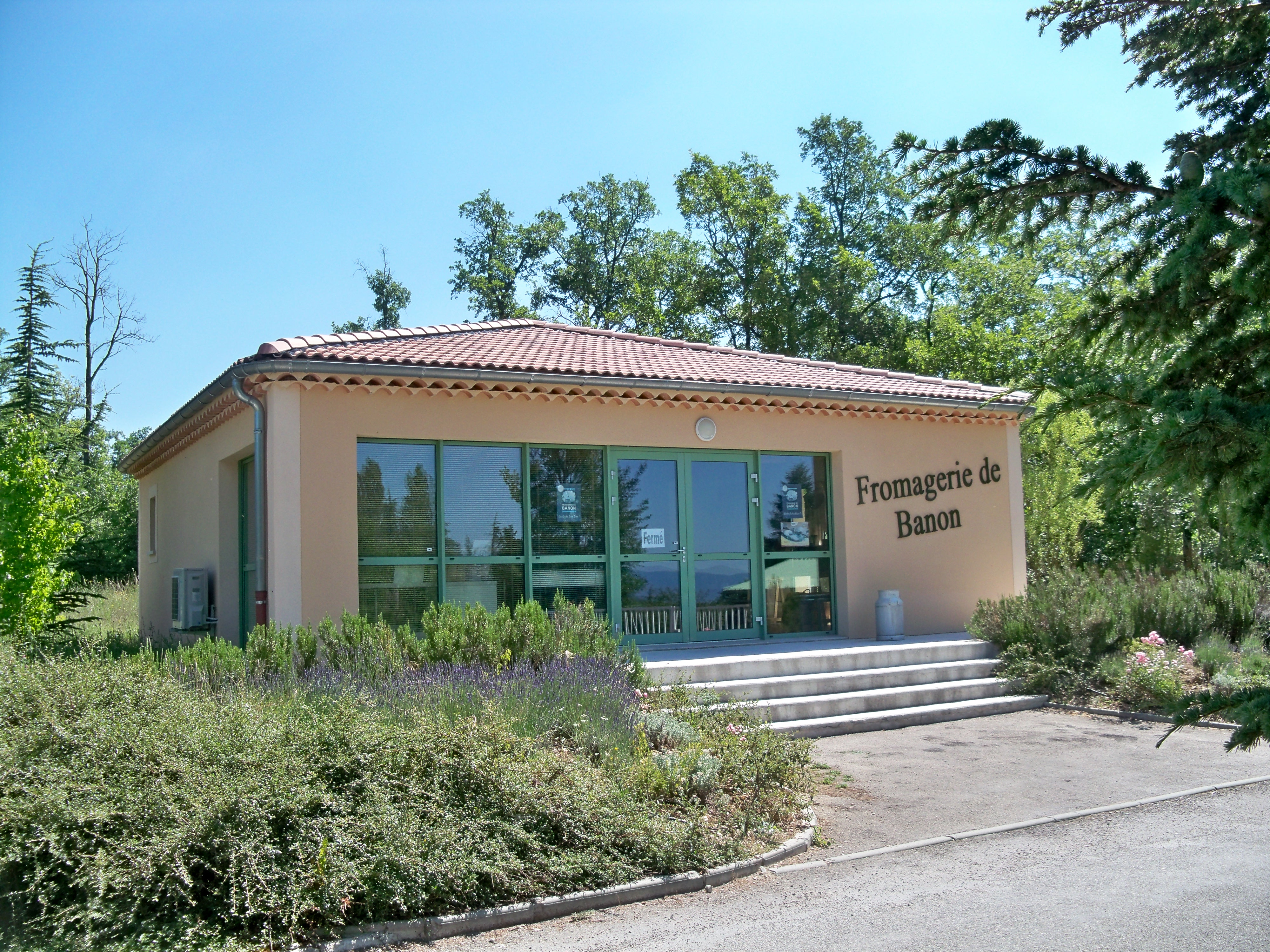 Fromagerie de Banon (04), spécialisée en fromage de chèvres